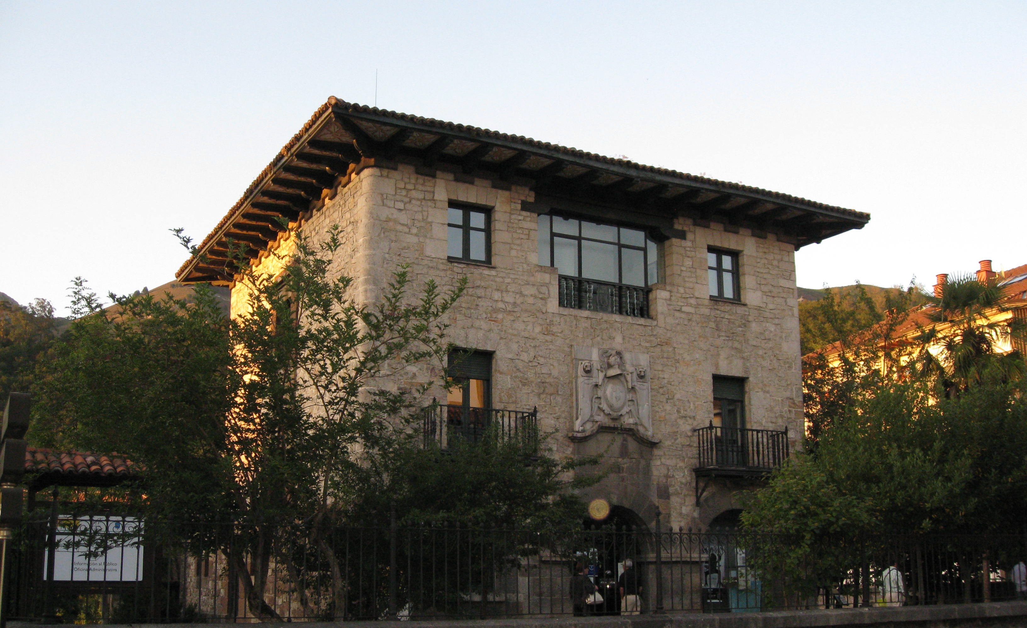 Casa Dagó, Cangas de Onís, Asturias.